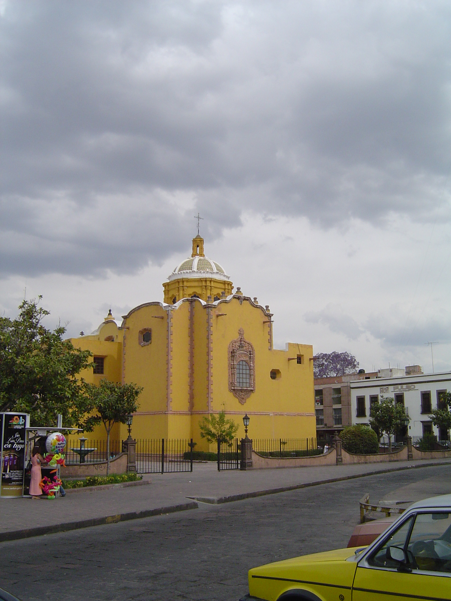 Capilla de Aranzazú en San Luis Potosi